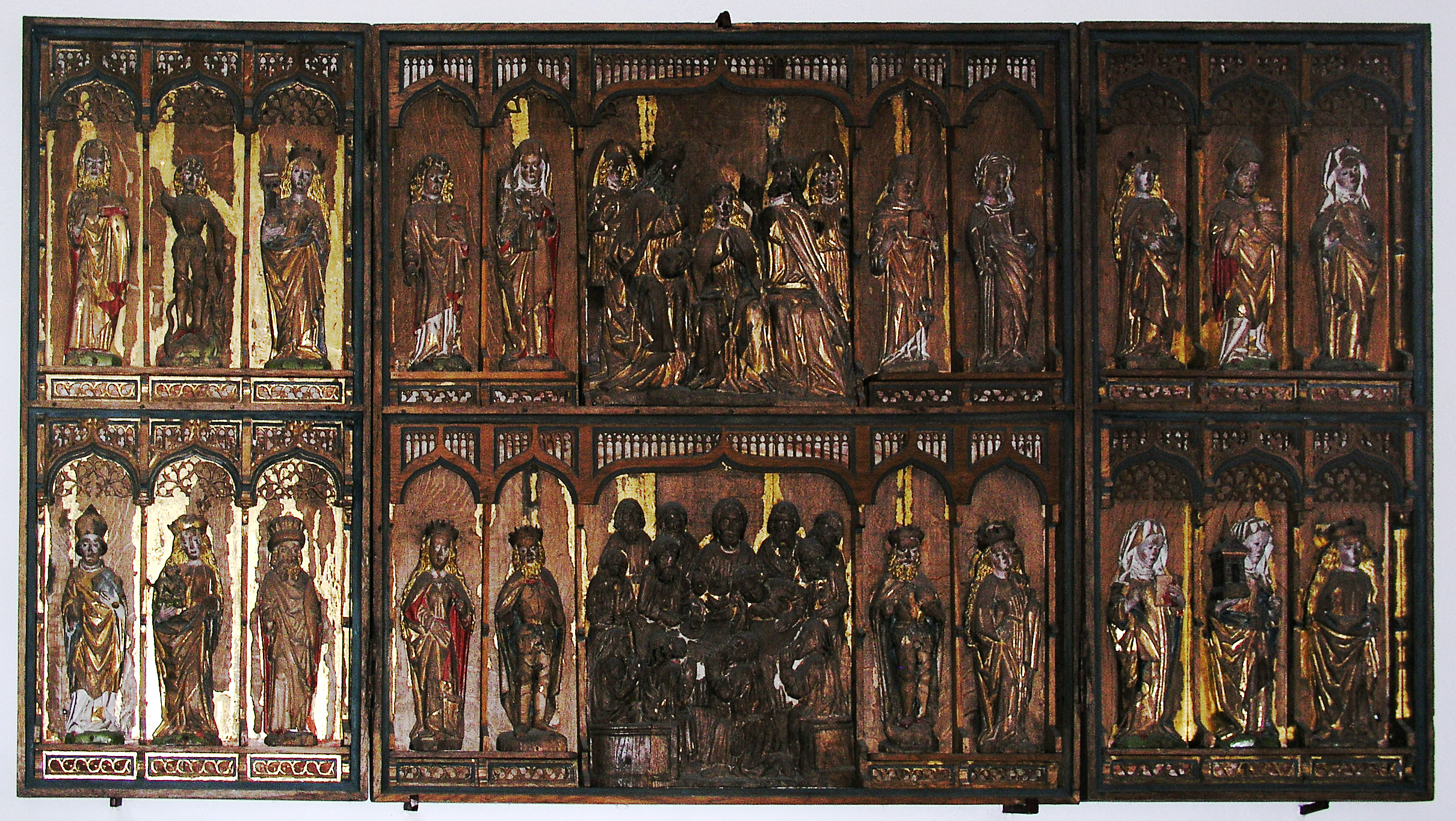 Rystad church, Diocese of Linköping, Linköpings kommun, Sweden